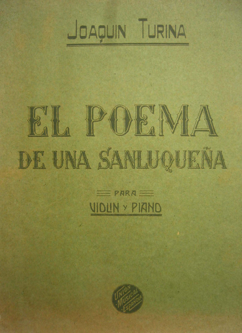 Joaquín Turina - El poema de una sanluqueña (partitura-portada) / (Partition Frontpage)